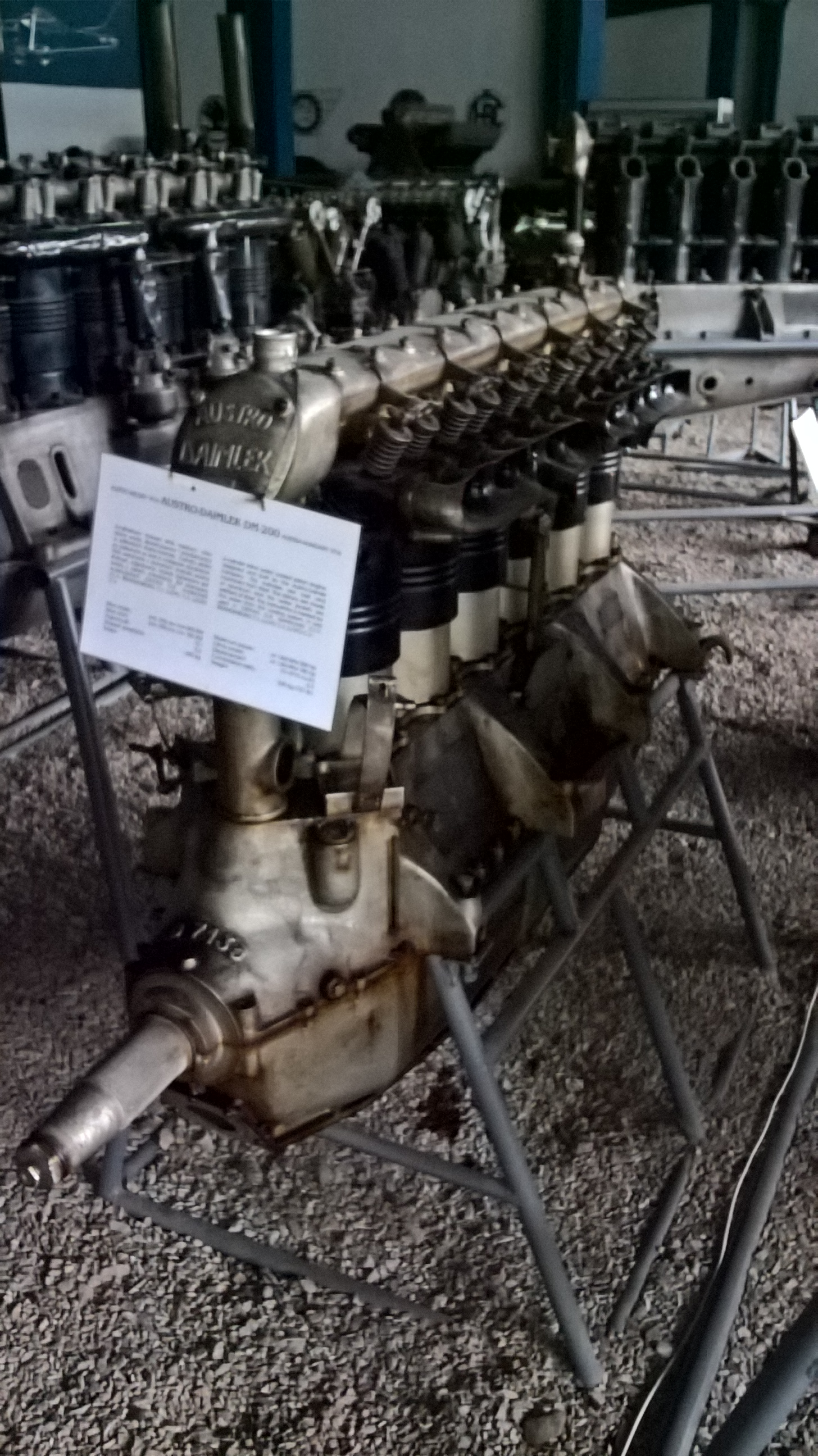 Austro-węgierski 6-cylindrowy silnik rzędowy Austro-Daimler DM 200 z 1916 r., eksponowany w Muzeum Lotnictwa Polskiego w Krakowie.